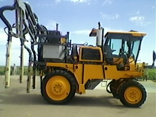 Un enjambeur de marque "Grégoire"